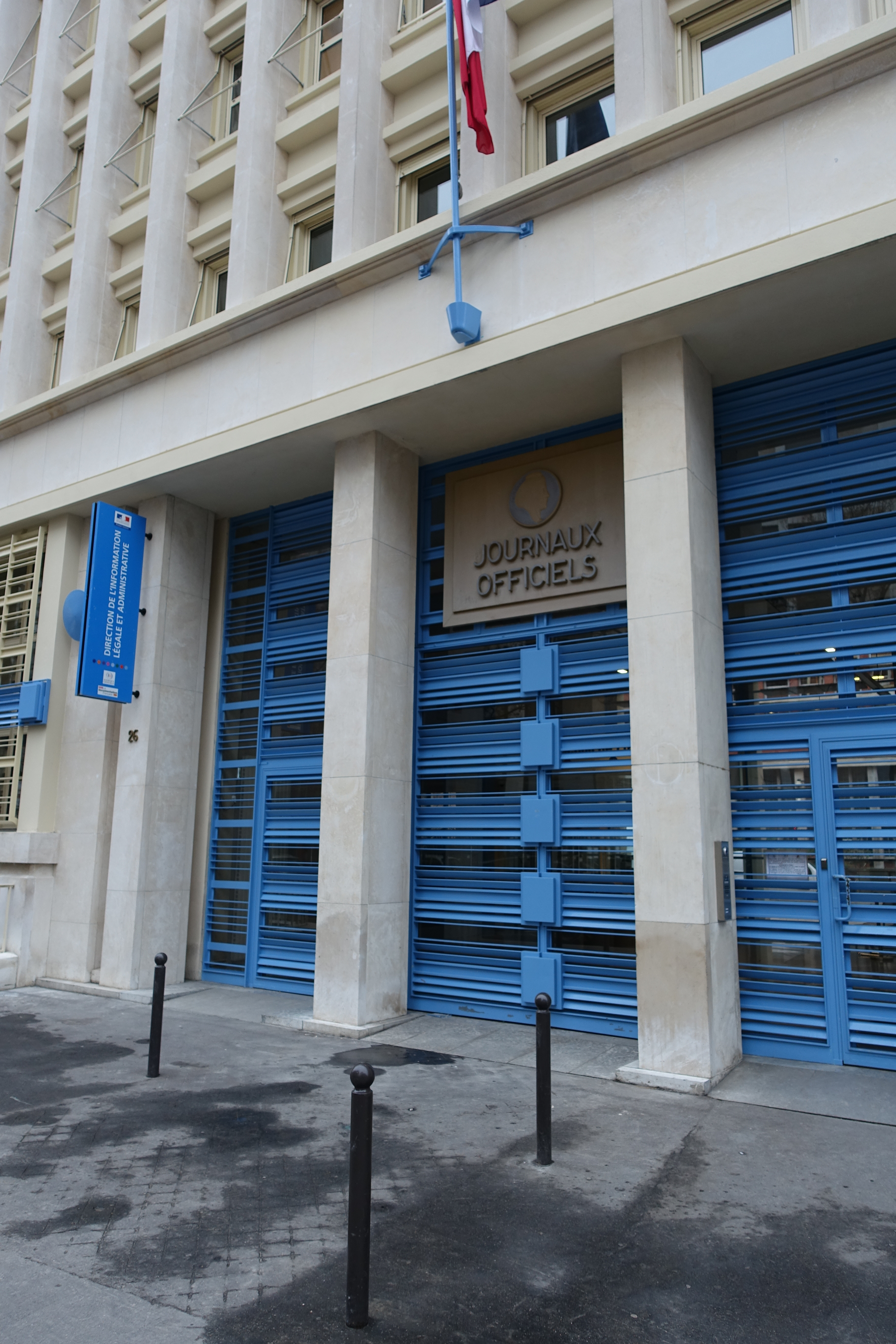 Journal Officiel, Direction de l'information légale et administrative, 26 rue Desaix, Paris, France.